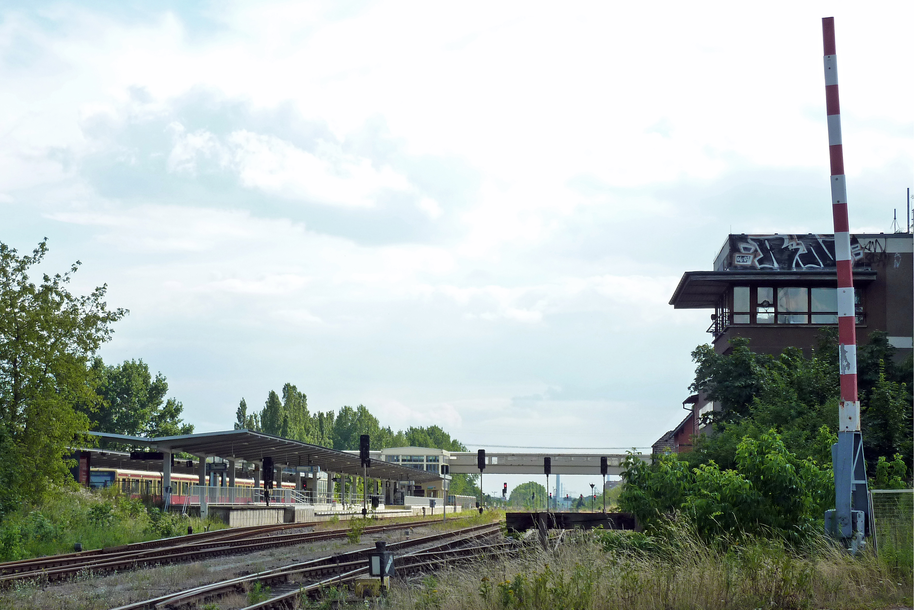 Blick zum Bahnhof Ahrensfelde in Berlin-Marzahn vom Bahnübergang an der Ahrensfelder Chaussee.